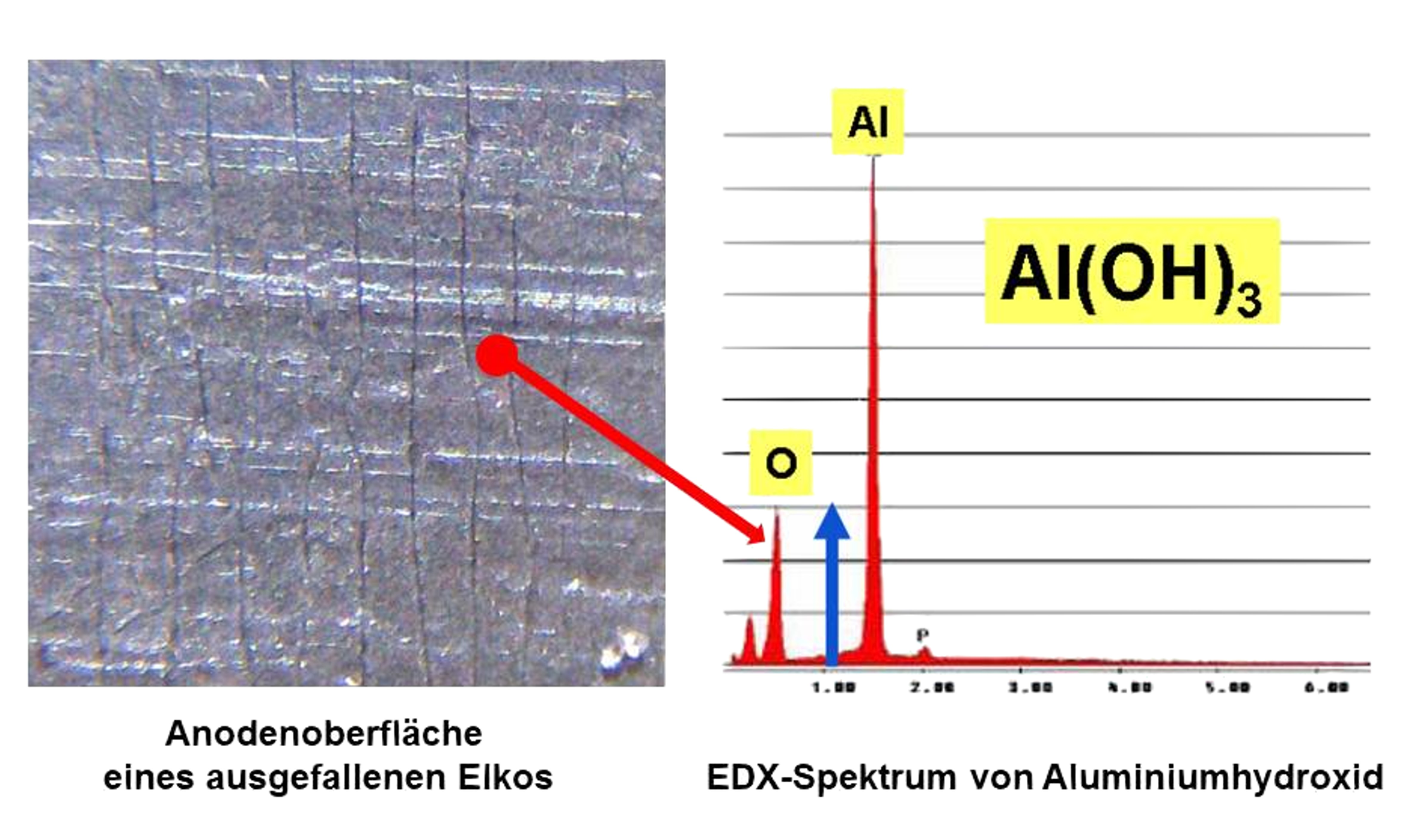 Anodenoberfläche eines ausgefallenen Elkos mit mit Al-Hydroxid zugewucherter Oberfläche